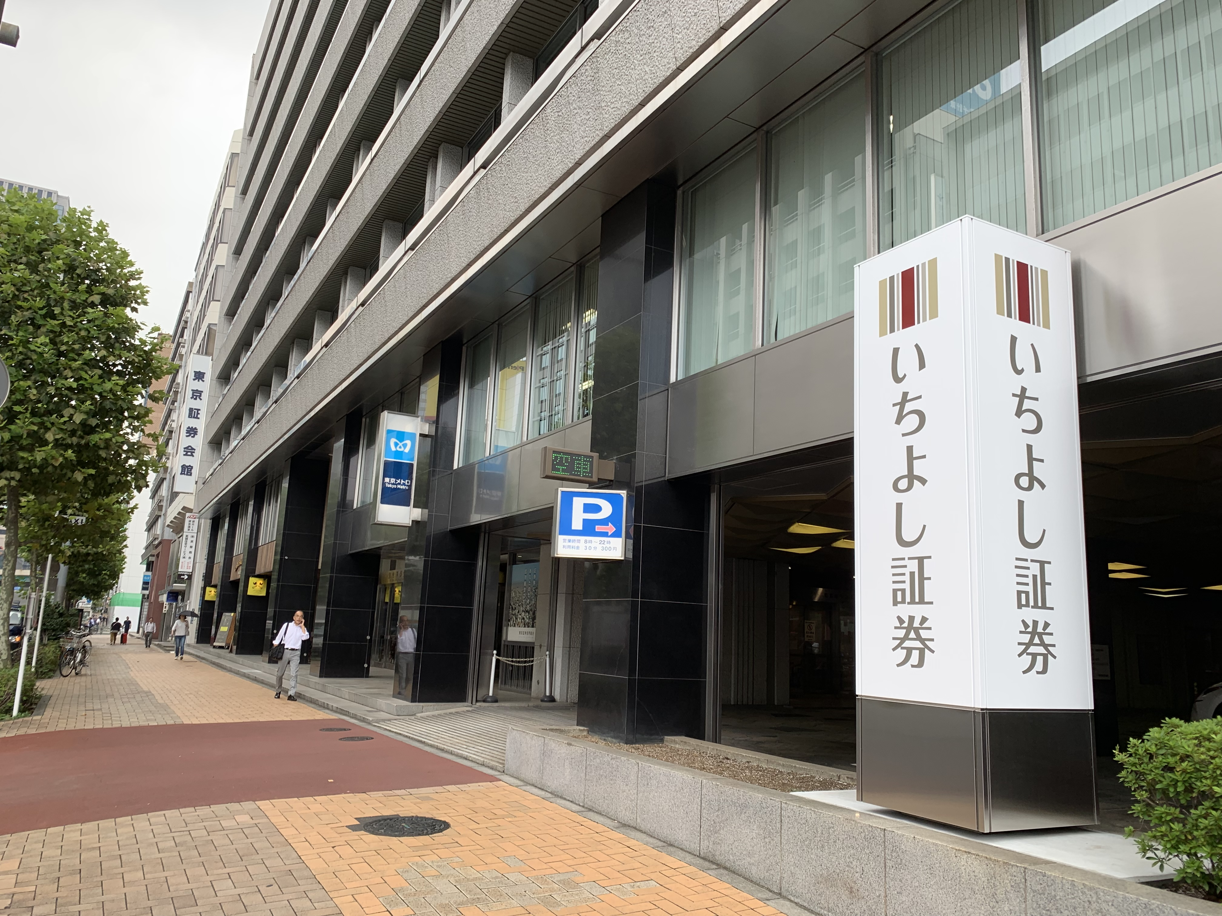 いちよし証券新本社の外観